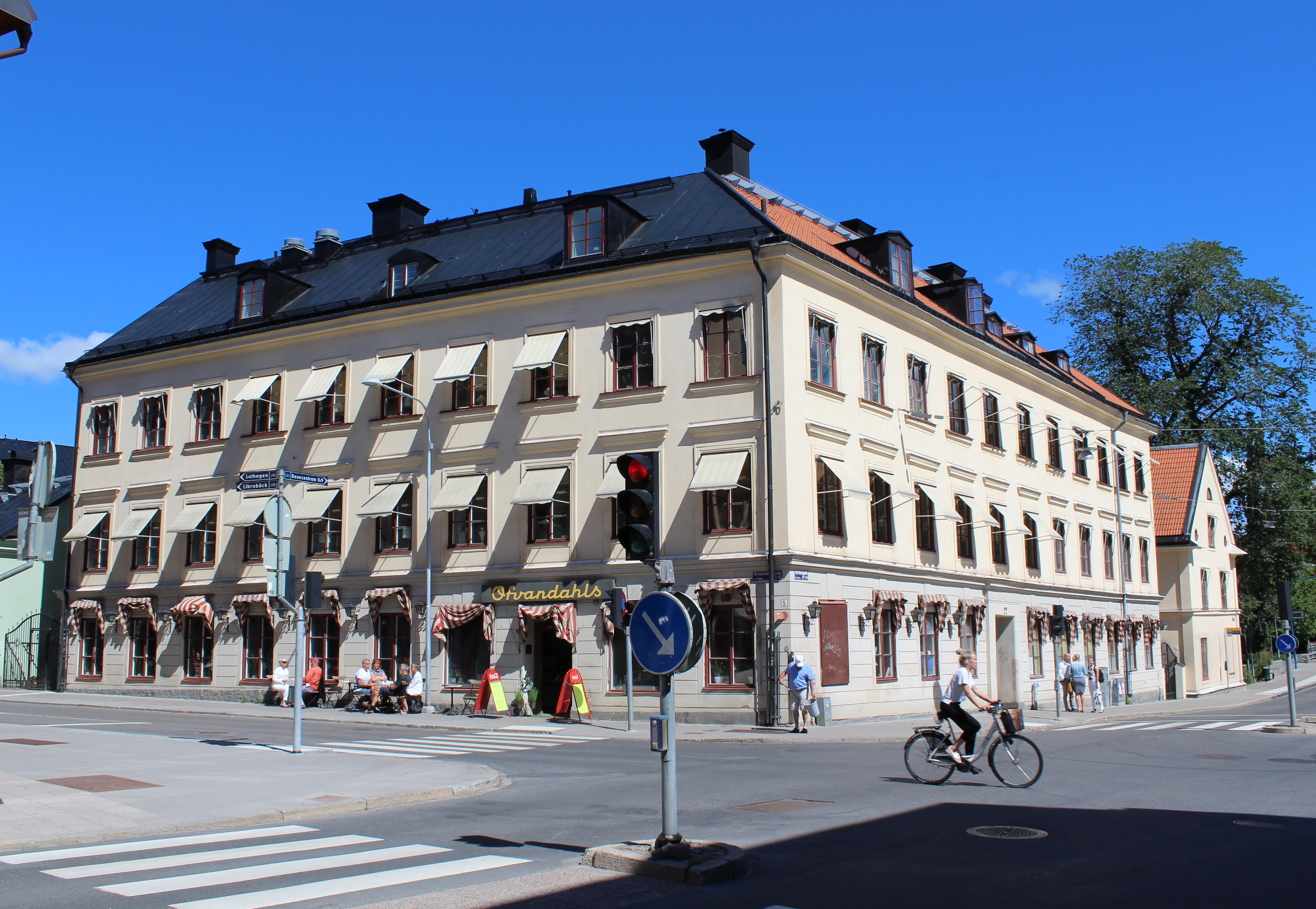 Ofvandahls, kafé i Uppsala